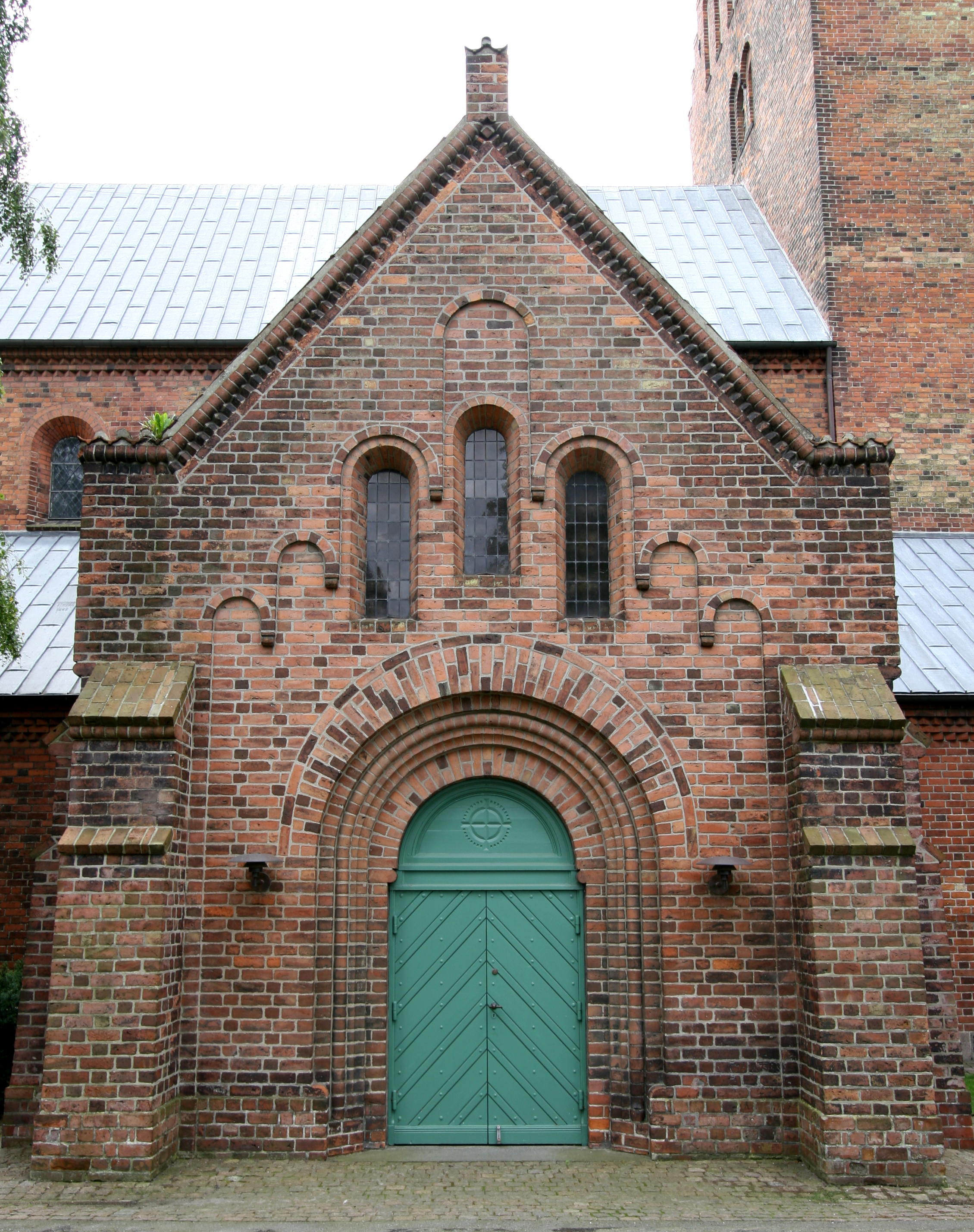 Gammel Vor Frue Kirke in Roskilde, Denmark. Entrance.